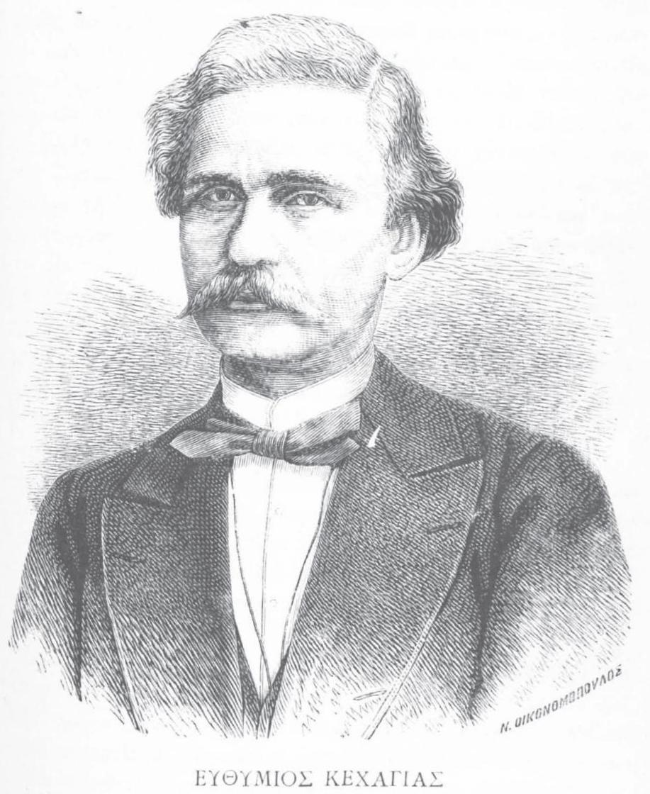 nahmhafte Griechische Persönlichkeit, 19. Jahrhundert